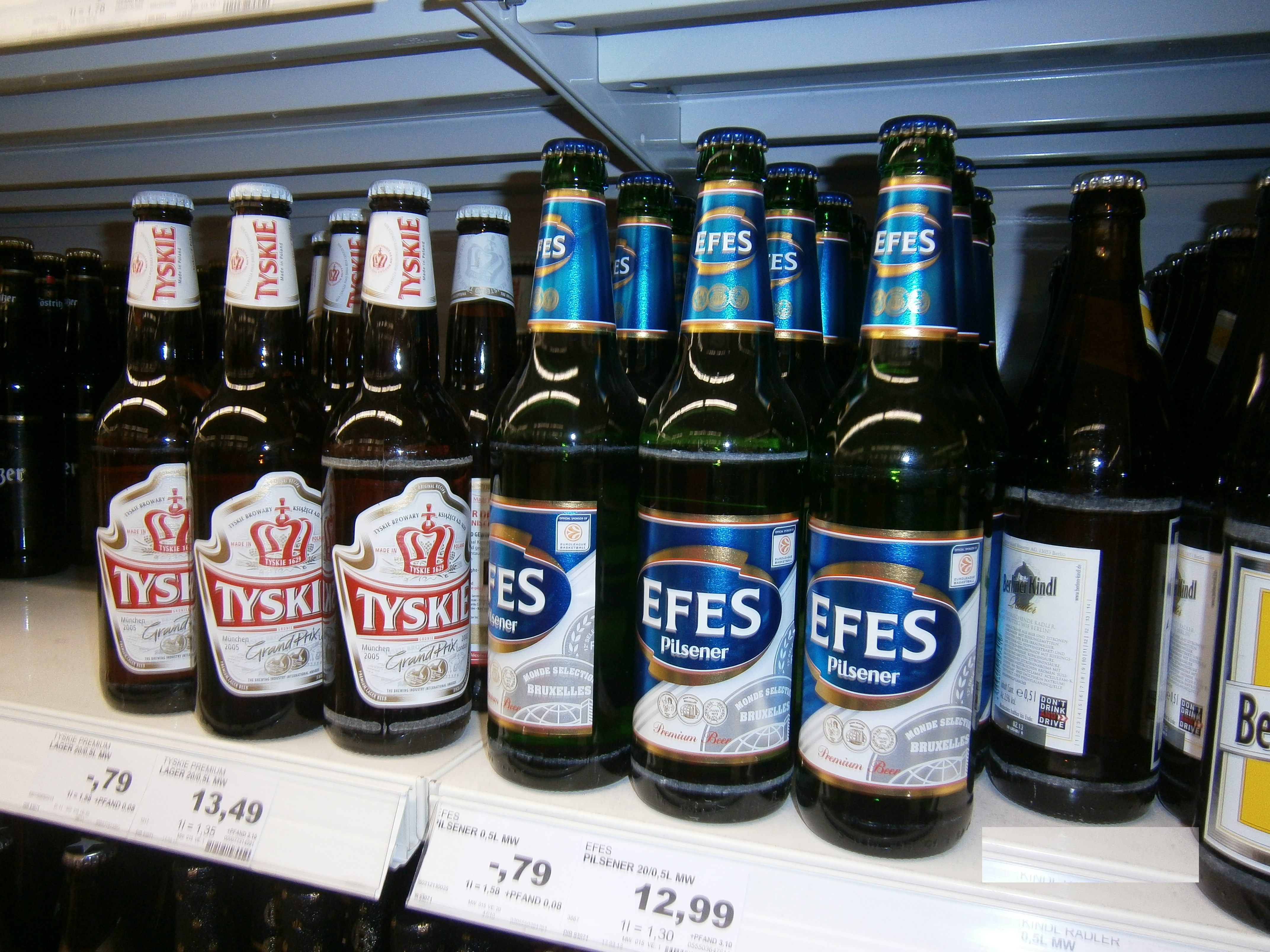 Ausländische Biersorten in der deutschen Kaufhalle. EFES-Pilsner aus der Türkei. Tyskie Grand Prix aus Polen.